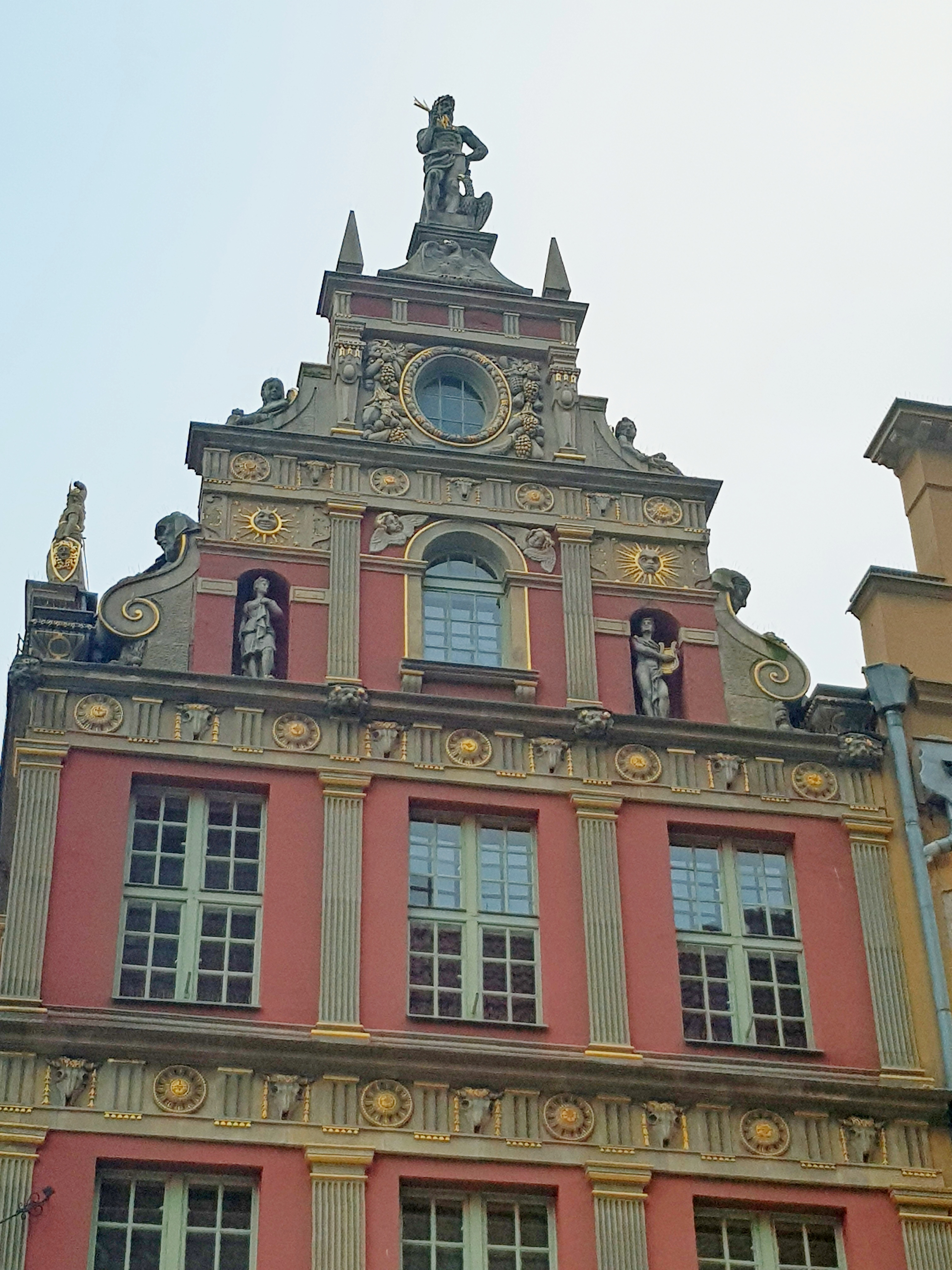 Gdańsk, Dom Schumannów, ul. Długa 45, detal